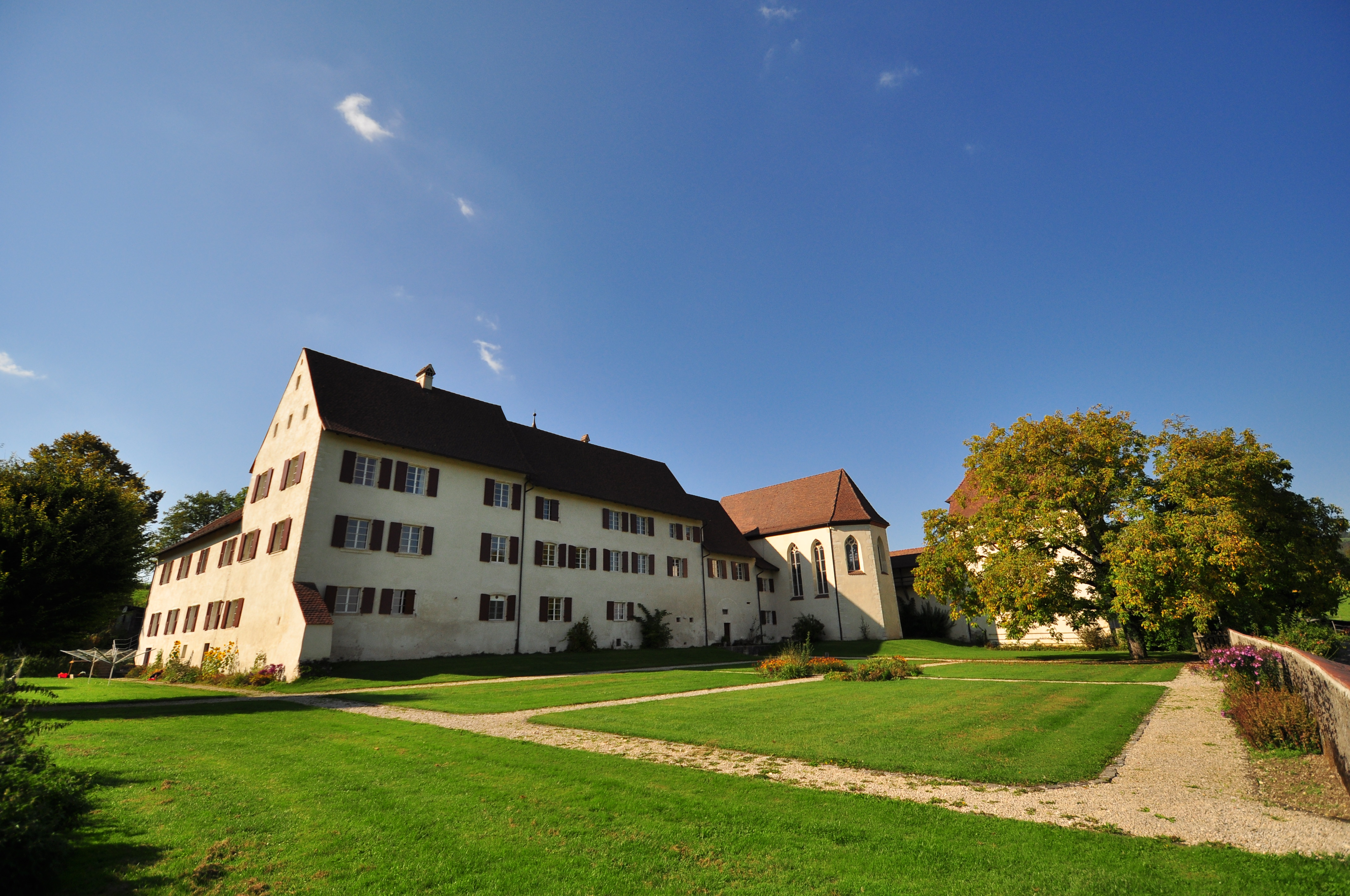 Pleigne Ancien Prieuré du Löwenburg